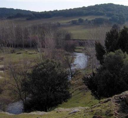 Río Pirón